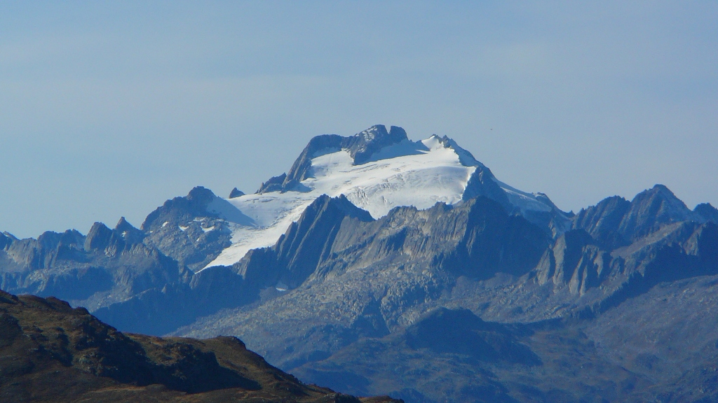 Oberalpstock im Kanton Graubünden in der Schweiz